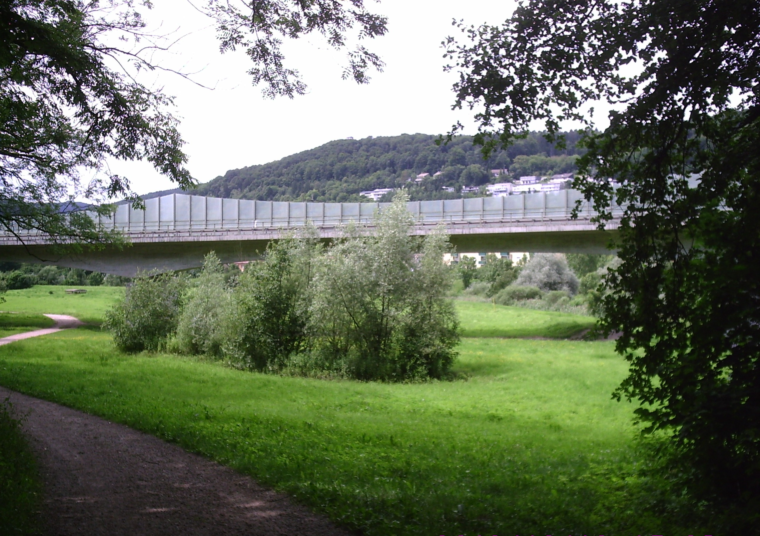 Tiengen Autobahnbrücke A98 beim Bürgerwaldtunnel Tiengen